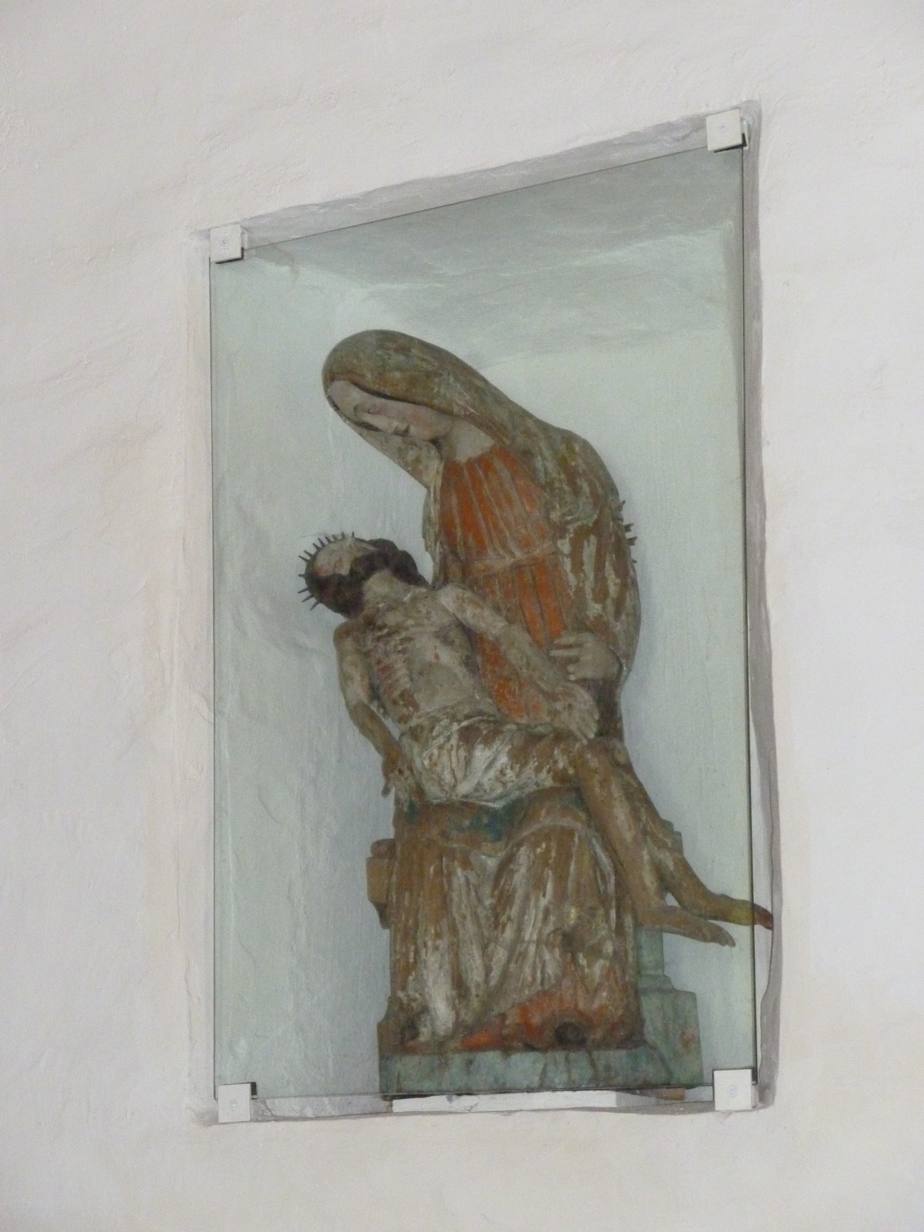 Kapelle St. Luzius Peiden: Pietà, um 1360